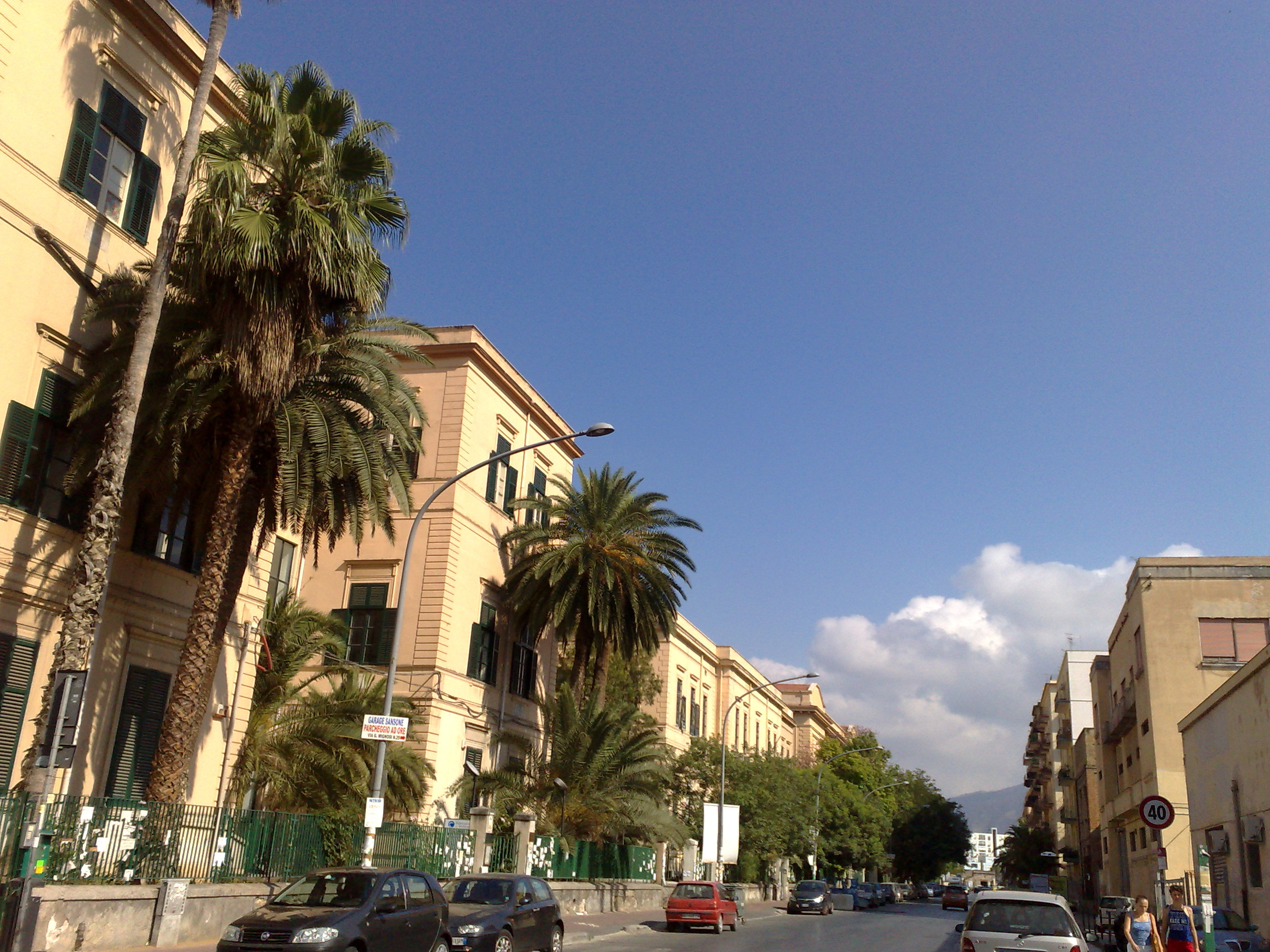 Palermo: Via Archirafi (sede di alcune facoltà scientifiche dell?università degli Studi di Palermo)